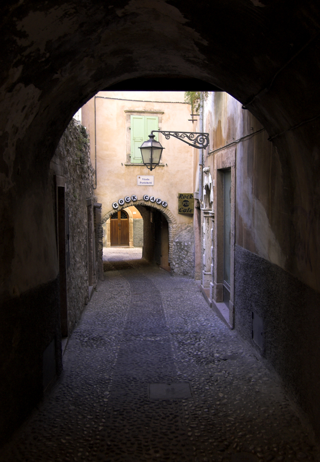 Lago di Garda, Malcesine